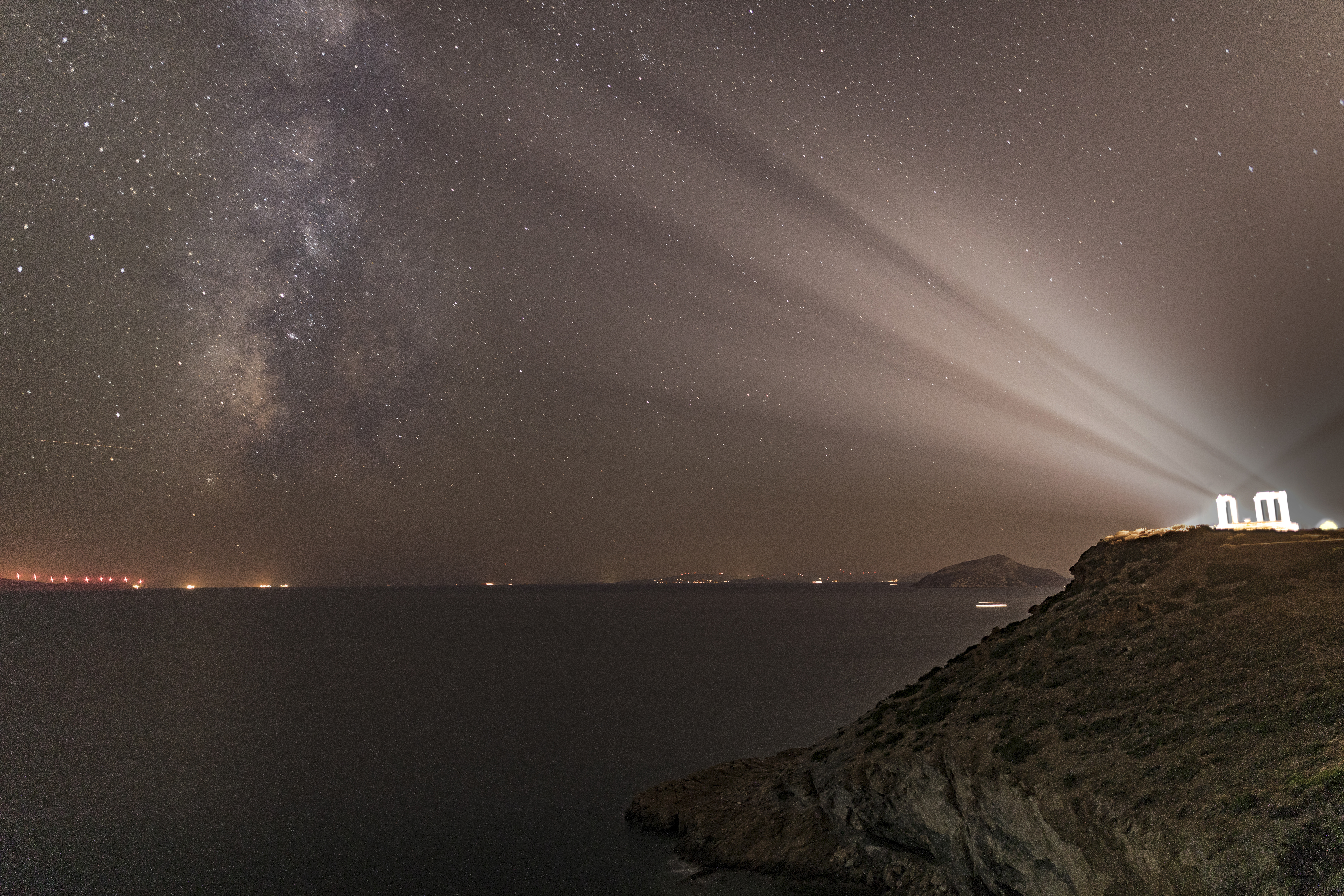 Σούνιο, αρχαιολογικός χώρος«Σούνιο, αρχαιολογικός χώρος»